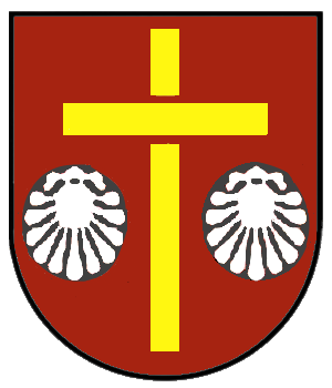 Wappen von Denkingen in der Stadt Pfullendorf, Baden-Württemberg, Deutschland